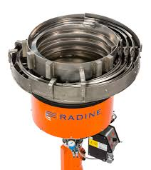 Trilvuller zonder producten